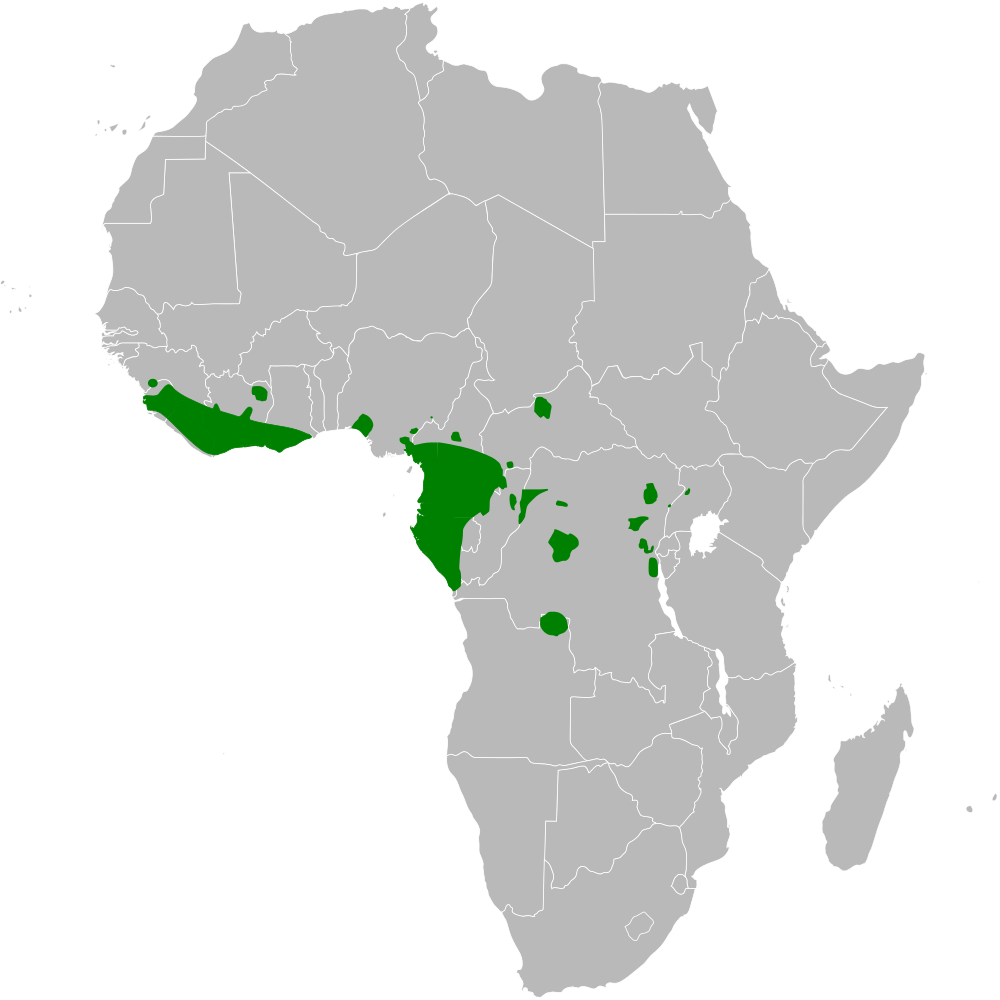 Sylvietta denti distribution map, based on